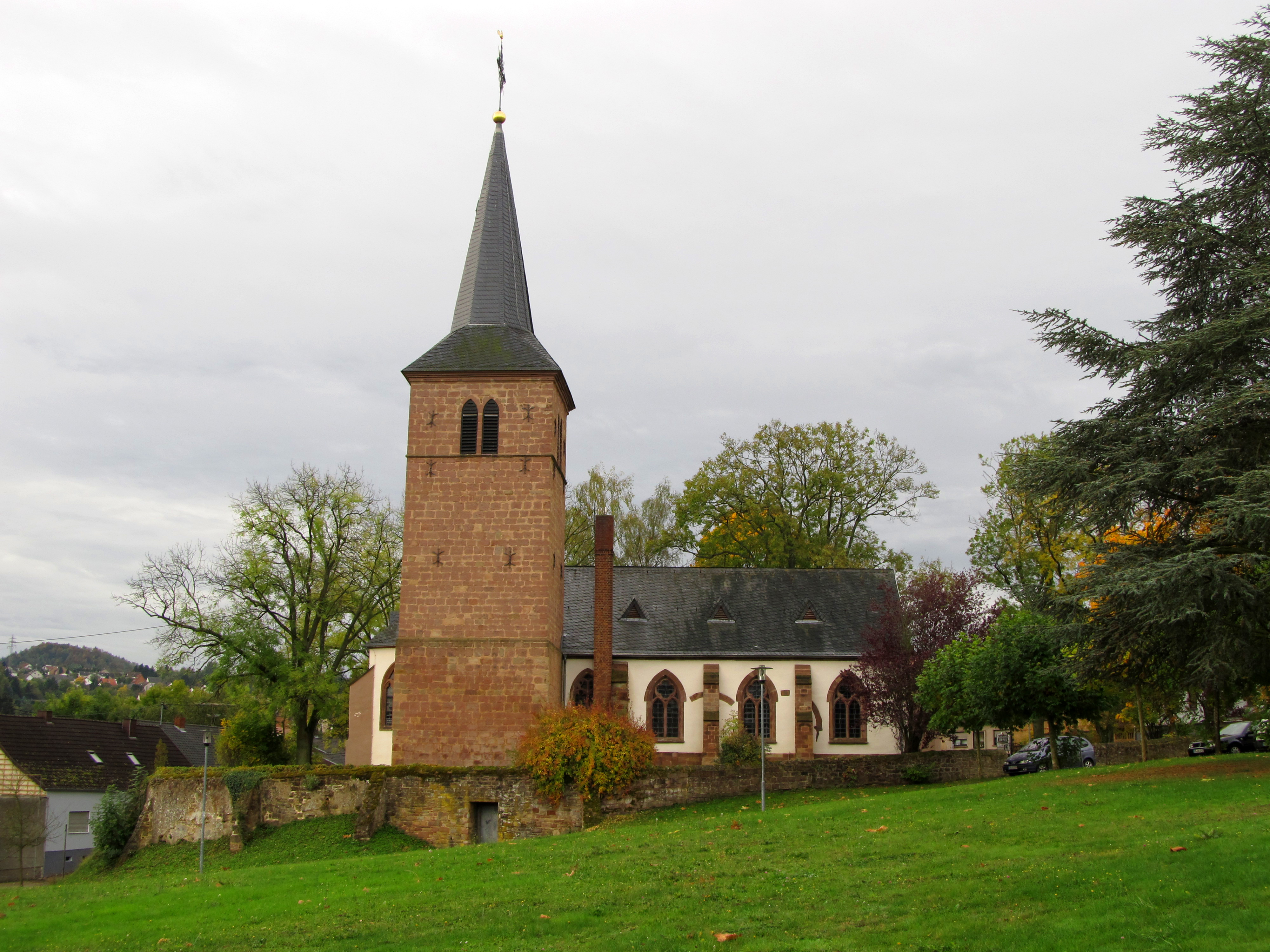 Die evangelische Martinskirche in Köllerbach, einem Stadtteil von Püttlingen, Saarland